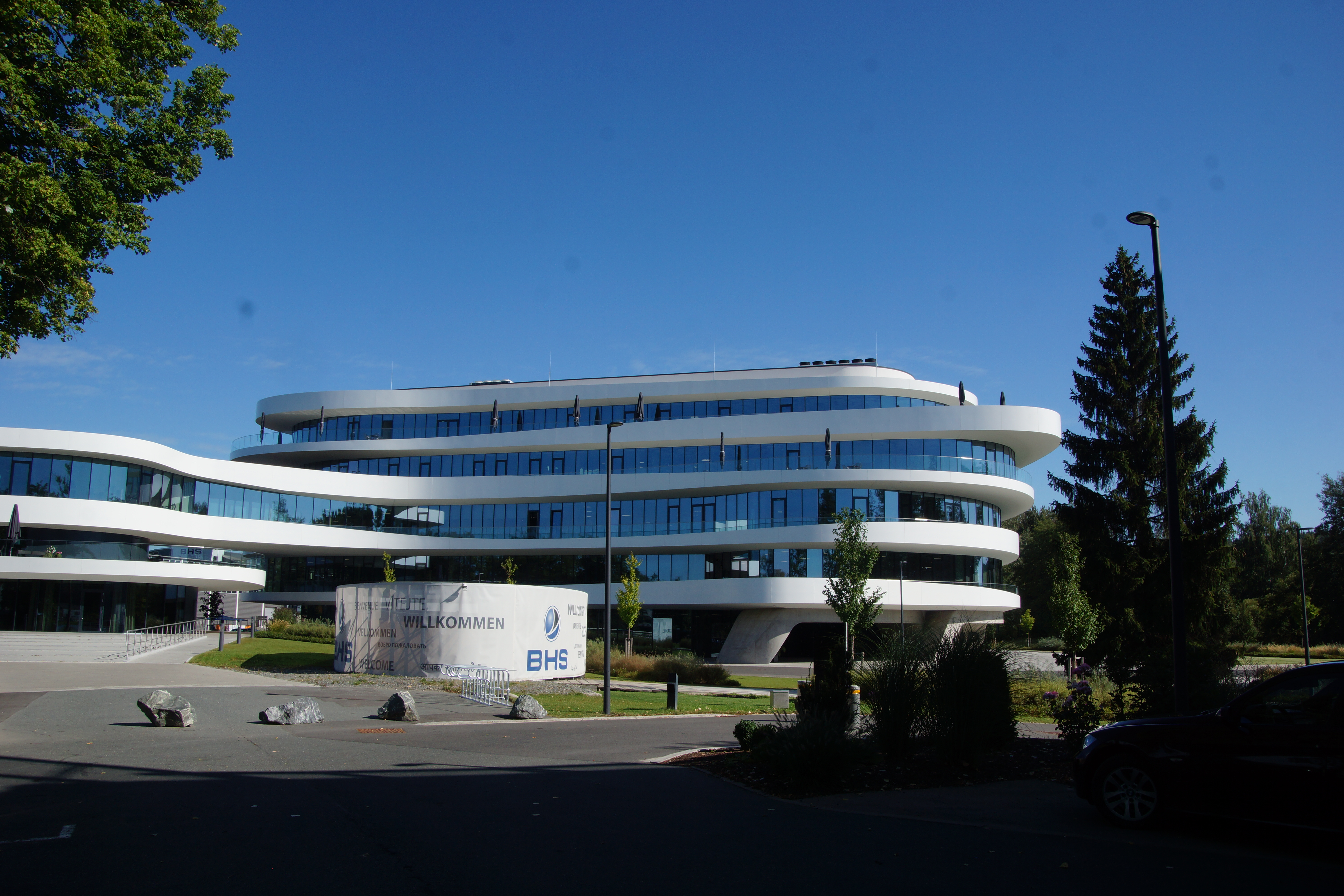 Weiherhammer